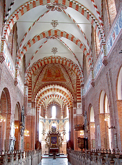 Kirkerummet - St. Bendts Kirke , Ringsted, Denmark